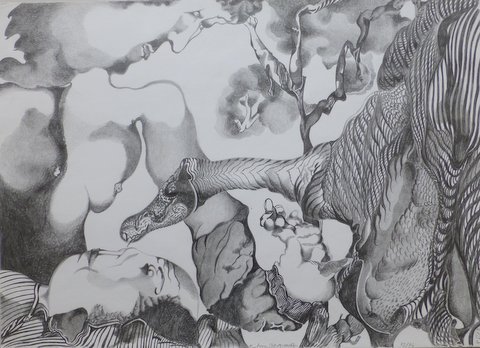 frühe Zeichnung von Heidrun Borgwardt, 1975-76